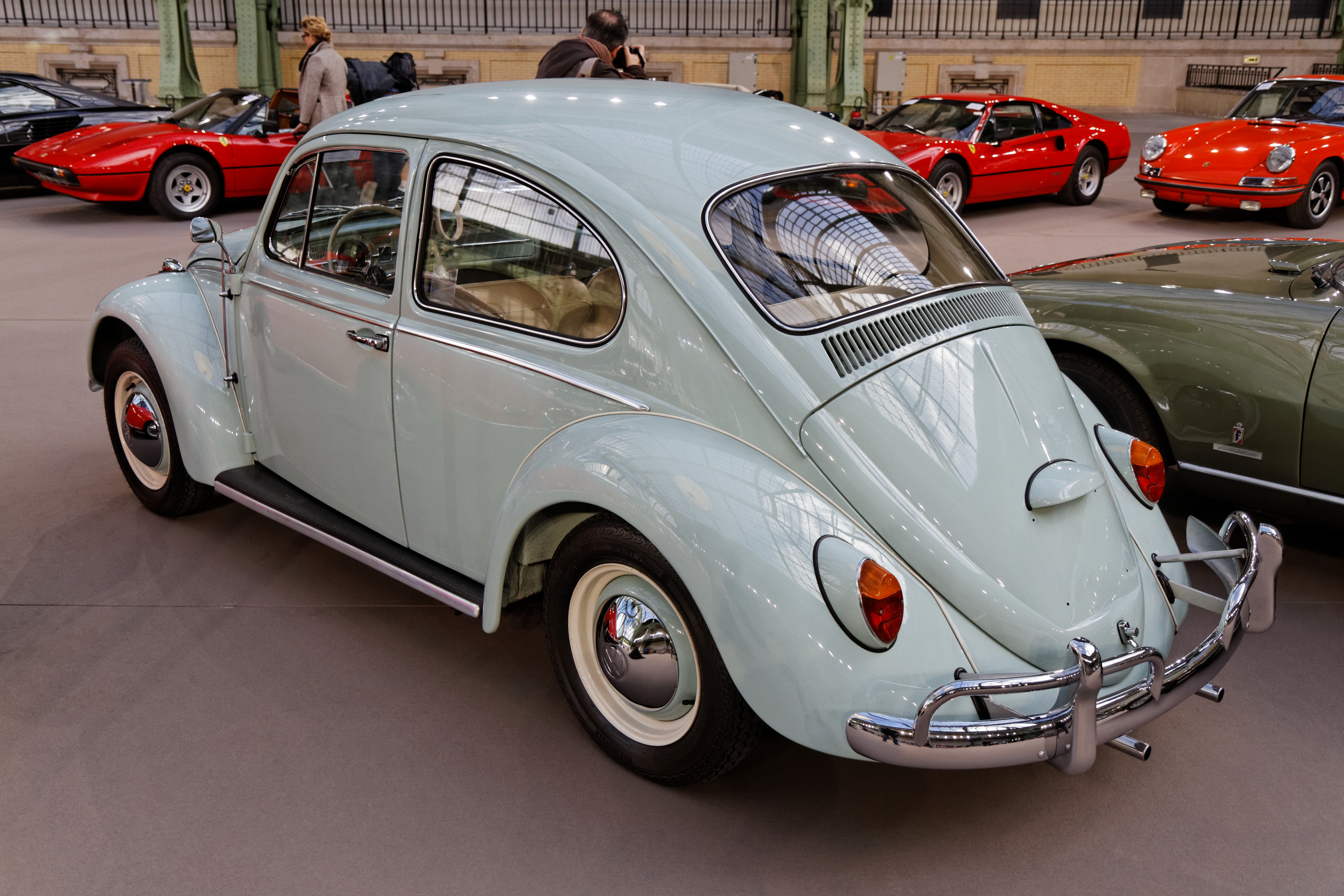 Une Volkswagen Beetle 1200 Saloon au Grand Palais lors de la vente Bonhams en février 2014.